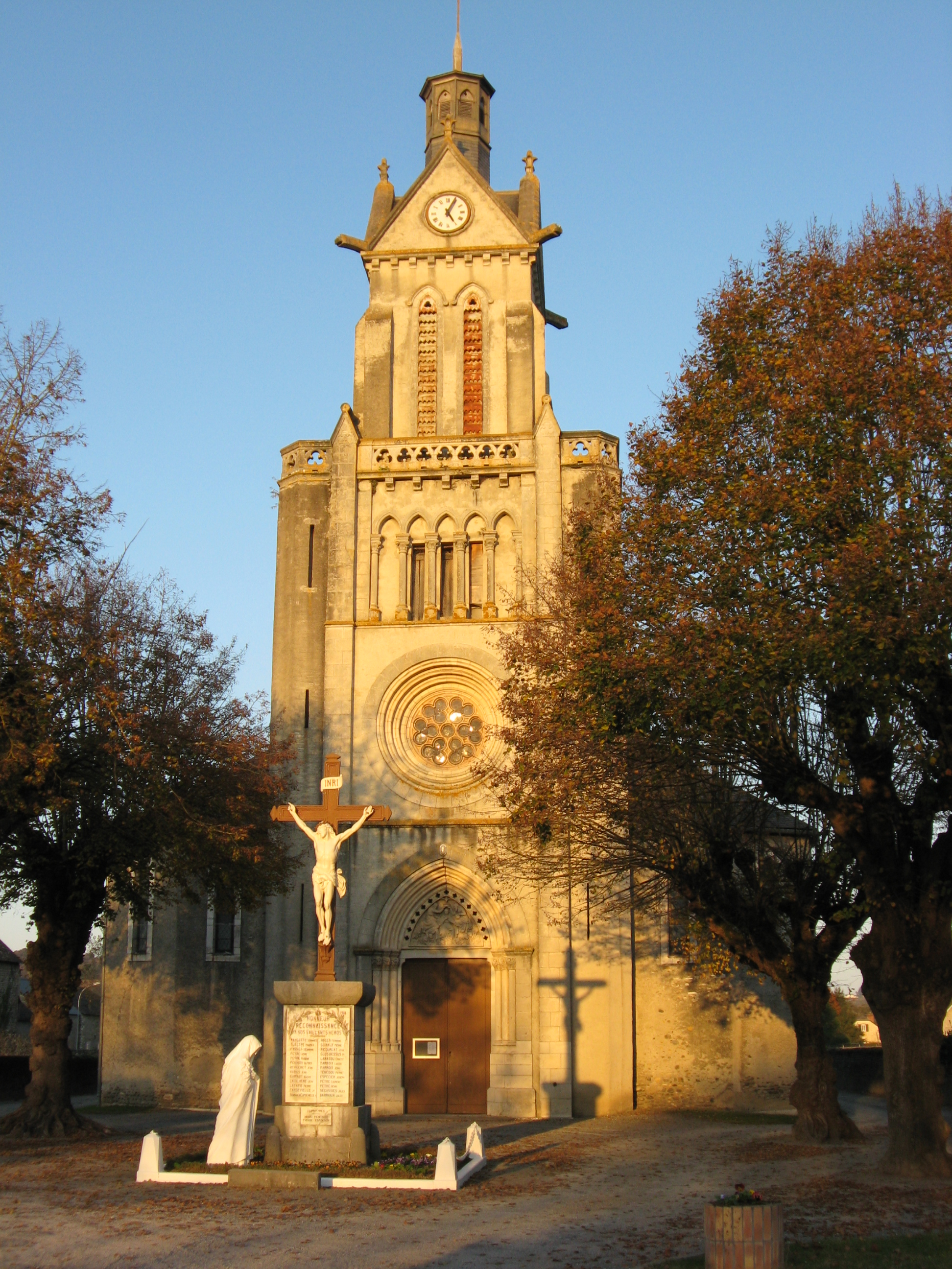 Eglise Saint Sévère d'Assat (Pyrénées).